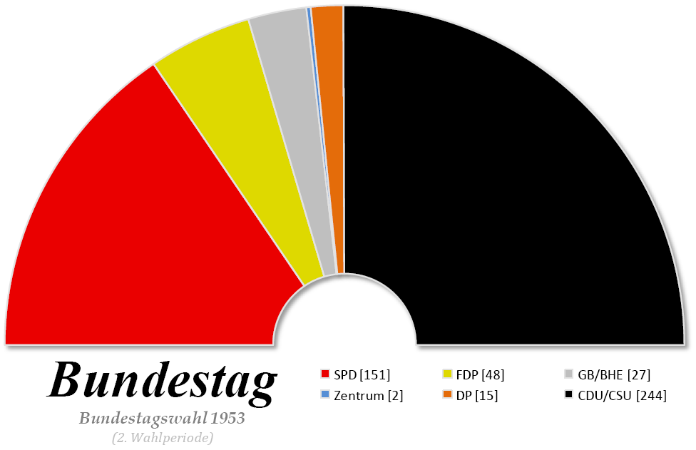 Projection graphique de la composition du 2ème Bundestag élu en 1953